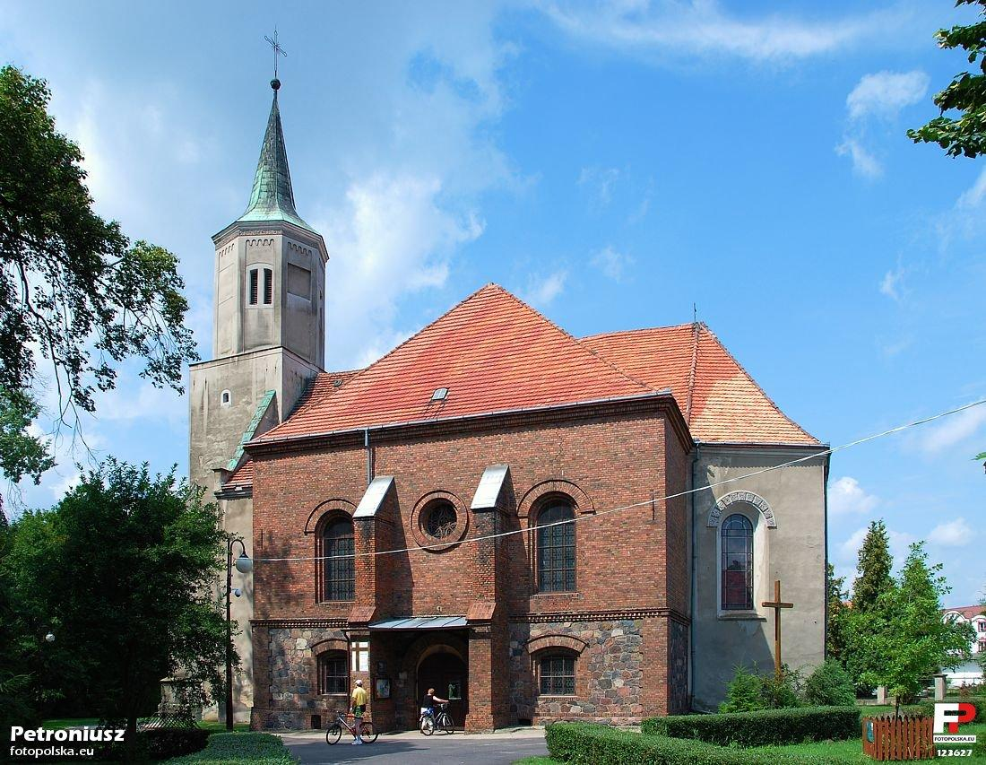 Sława - kościół pw. św. Michała Archanioła (zabytek nr 19 (208) z 31.05.1950)